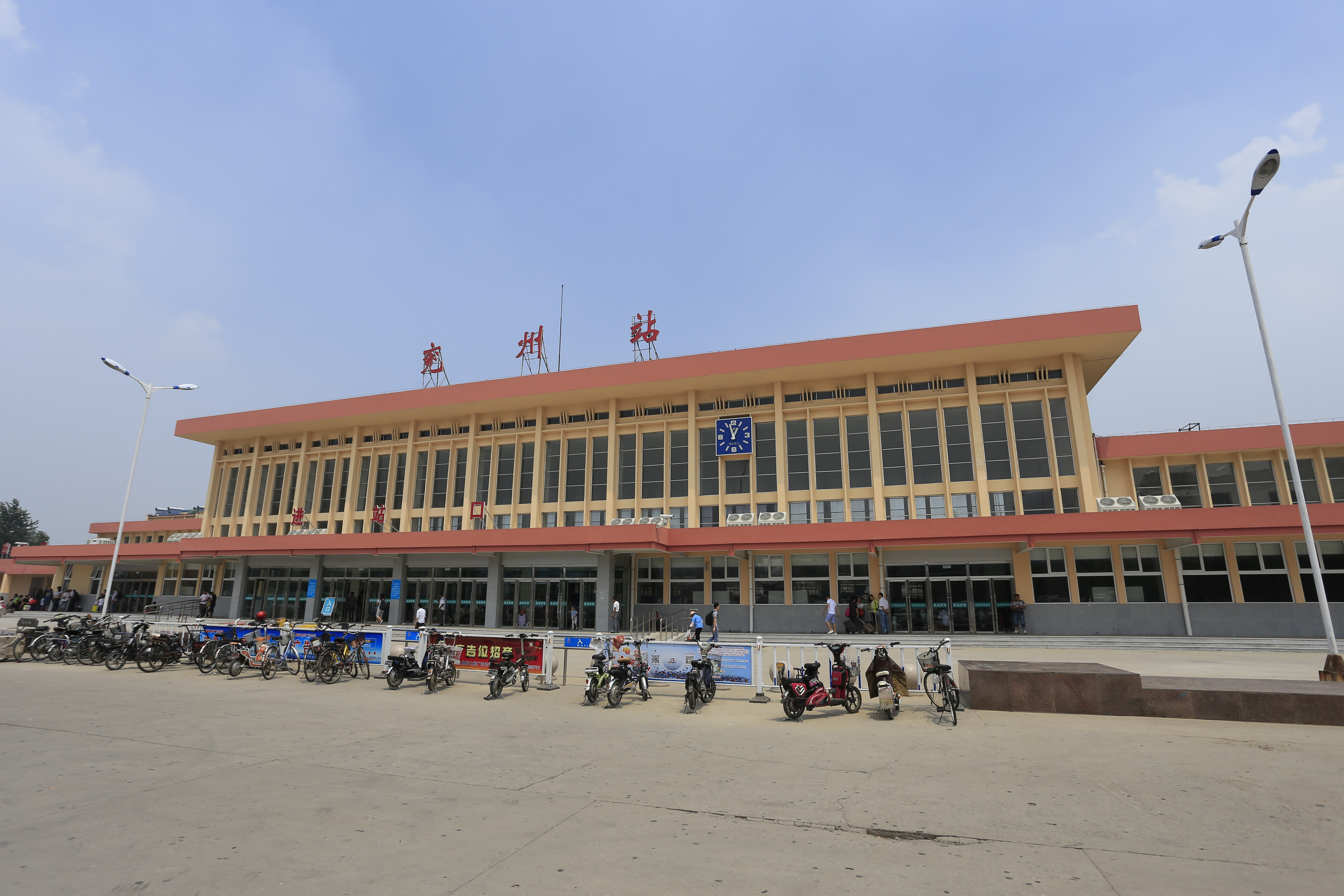 兖州站